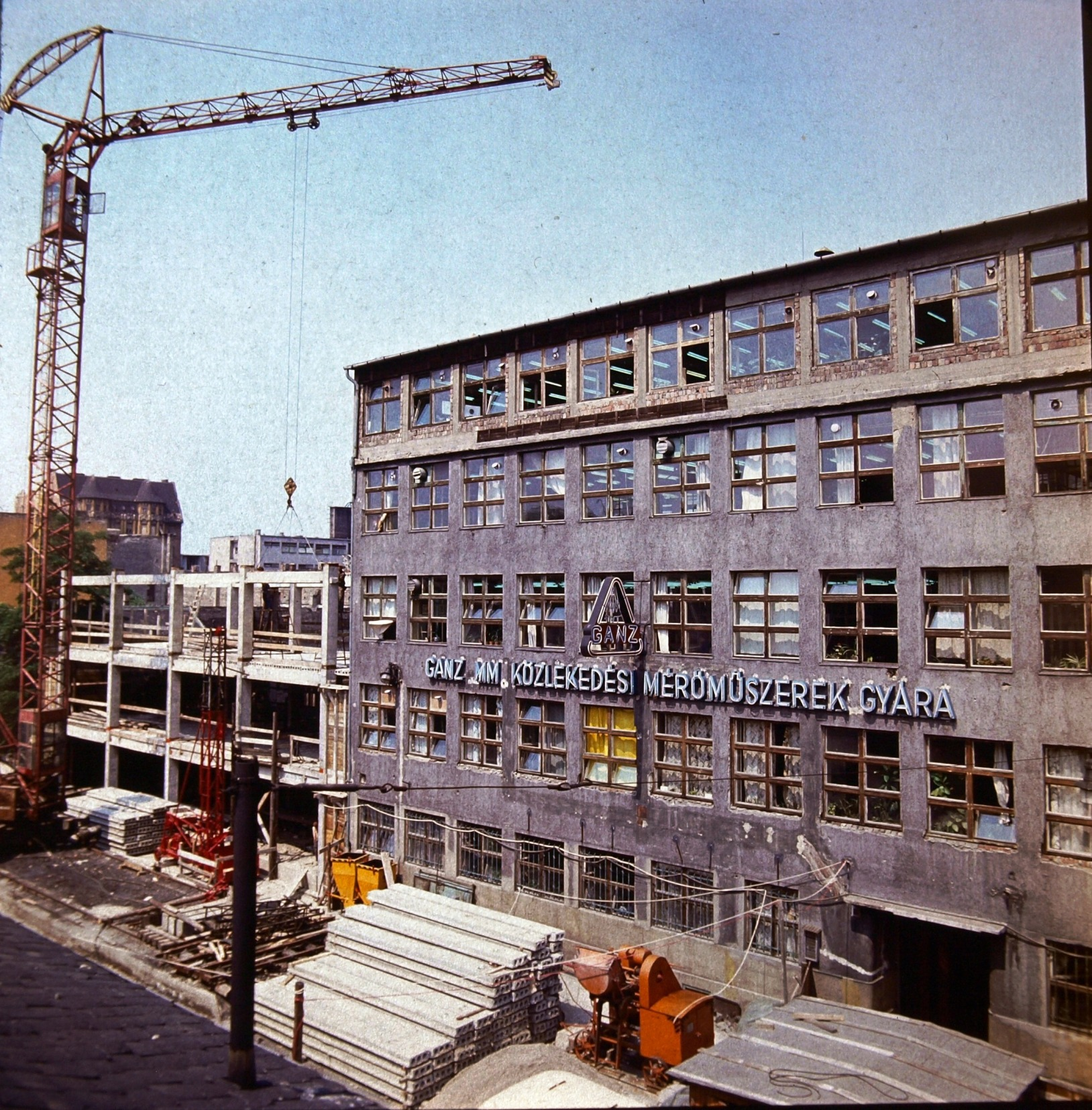 A Ganz Műszer Művek Közlekedési Műszerek gyára bővítése